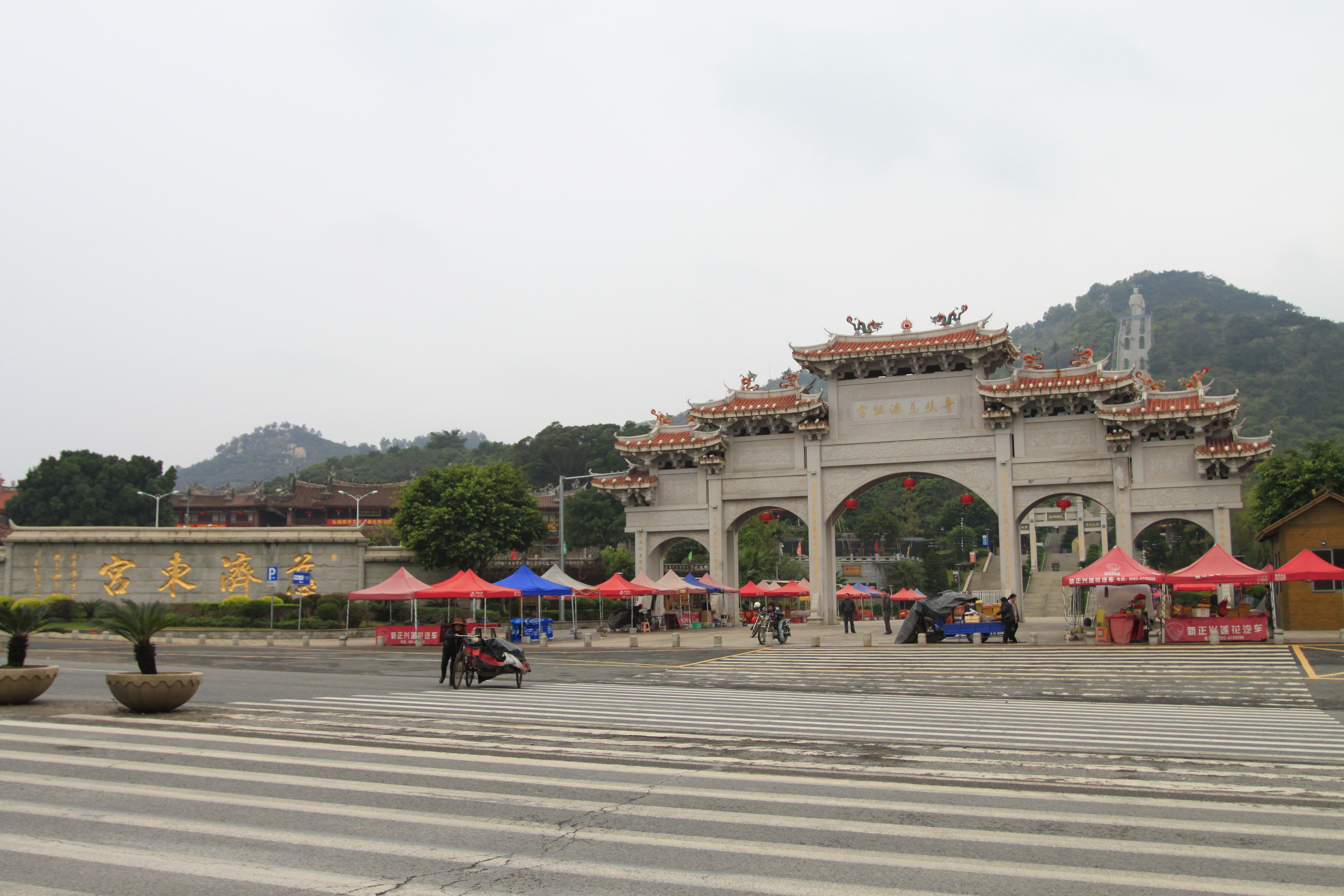 青礁慈济宫，位于中国福建省厦门市，是全国重点文物保护单位。